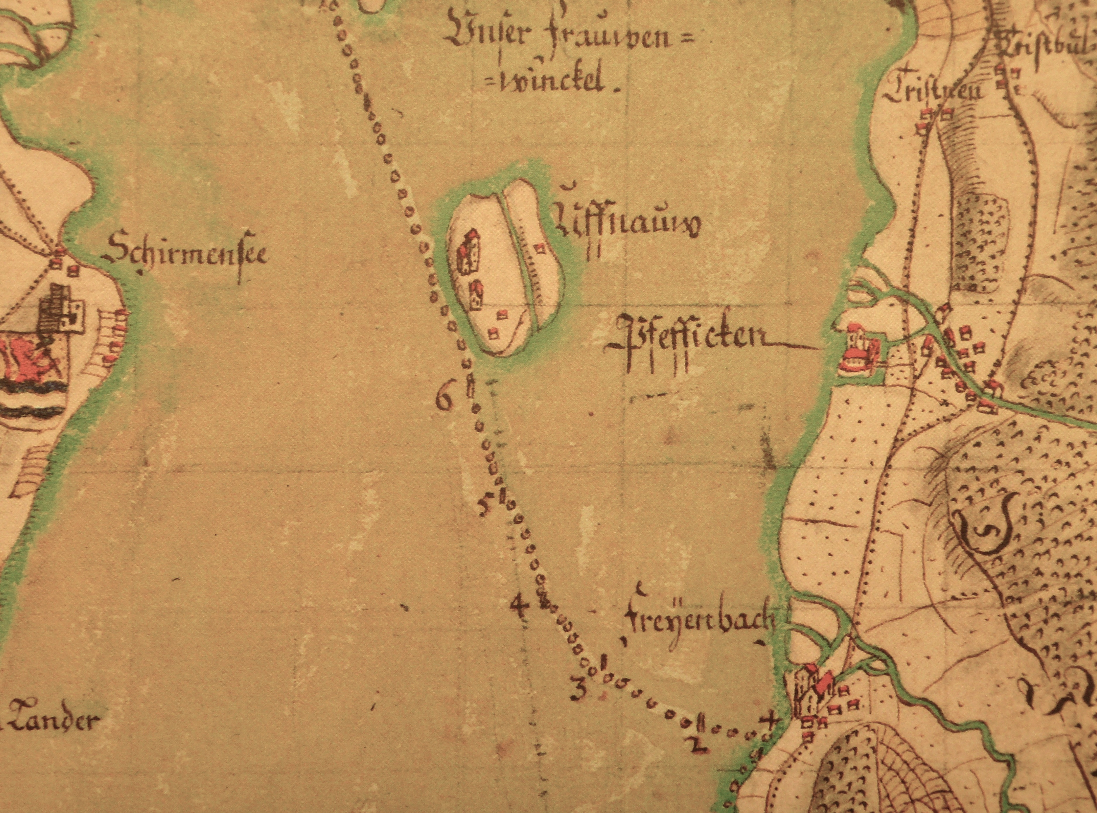 Hans Conrad Gyger: Ufenau auf der «Karte des Kantons Zürich aus dem Jahr 1667 in 56 Blättern von Hans Conrad Gyger».